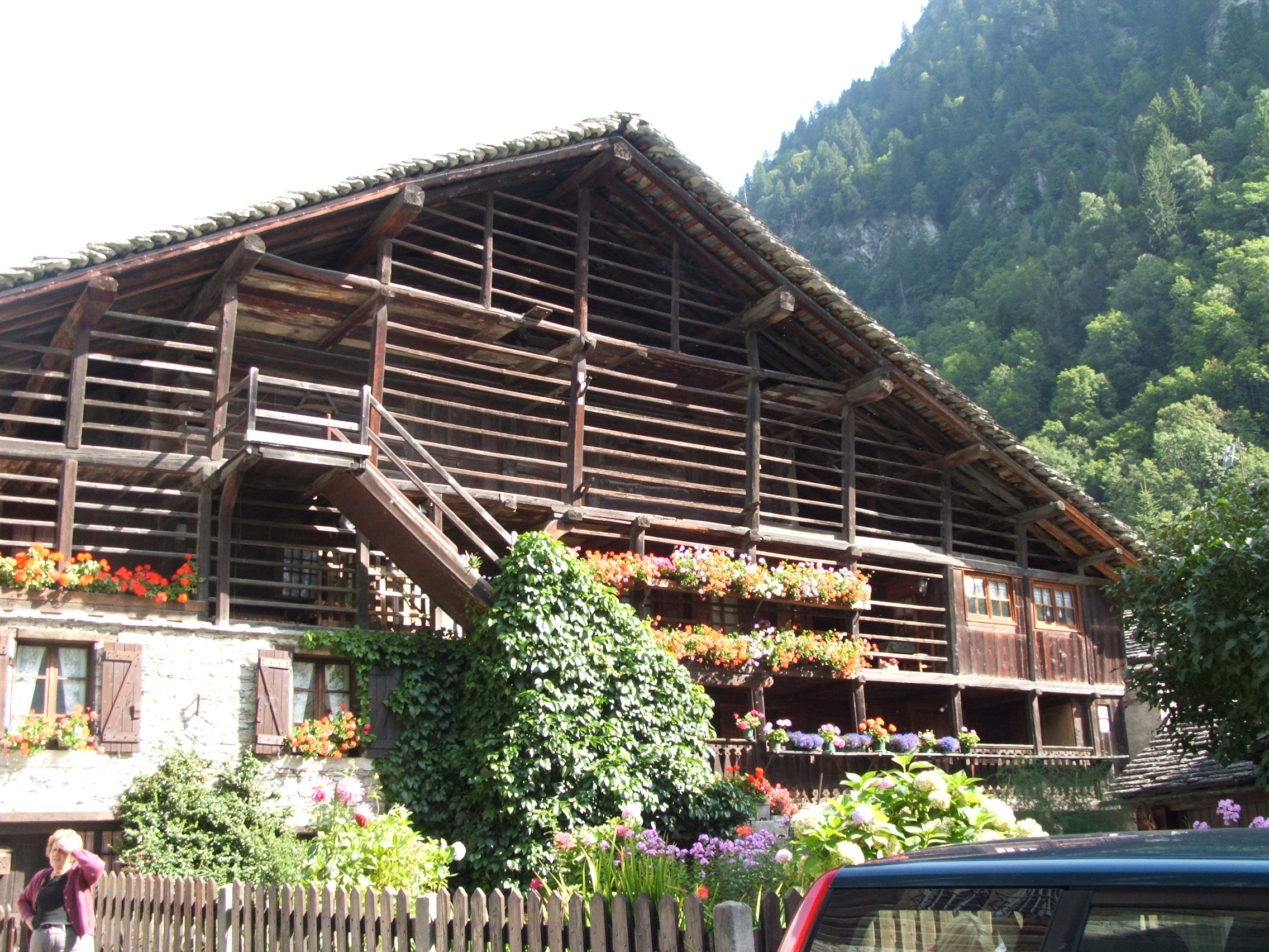 Immagine da Alagna Valsesia